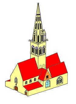 Reconstitution de l'église au 14e siècle